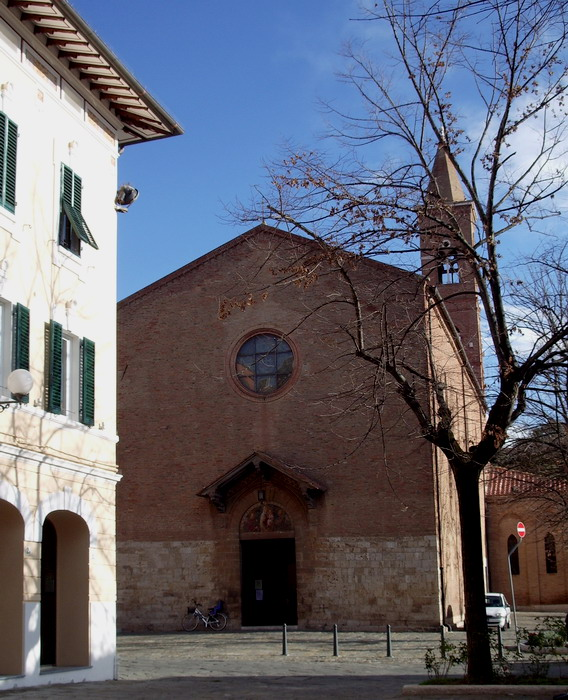 Facciata della Chiesa di San Francesco a Grosseto